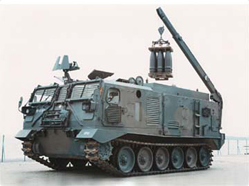 [乗員]8人 [全備重量]約23.5t [全長]7.17m [全幅]2.99m [全高]3.0m [回転半径]信地 [最高速度]約50km/h [エンジン] 水冷2サイクル8気筒 ディーゼル機関 411ps/2,300rpm [武装]12.7mm重機関銃 [製作]日立製作所 野戦特科部隊に装備し203mm自走りゅう弾砲に随伴して継続的に弾薬補給を行う。重砲けん引用の73式けん引車の車体を利用し、上構部分が弾薬庫となっている。弾の揚降は車体後部にされた、揚力約1トンの油圧式クレーンを利用して行い、1回で10発を吊り上げることができる。